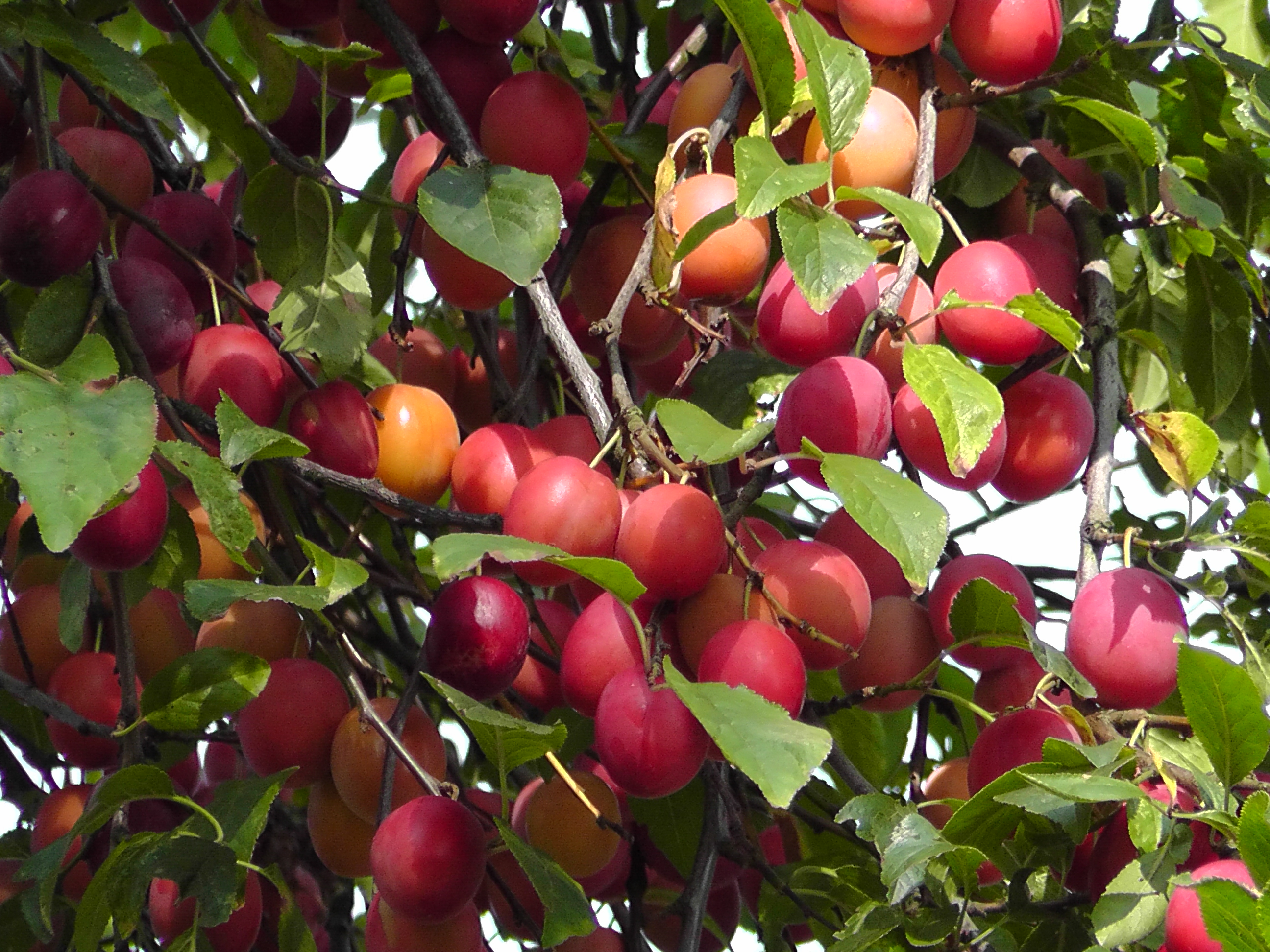 rote Kirschpflaumen